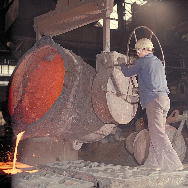 Original image description from the Deutsche Fotothek Facharbeiter für Gießereitechnik